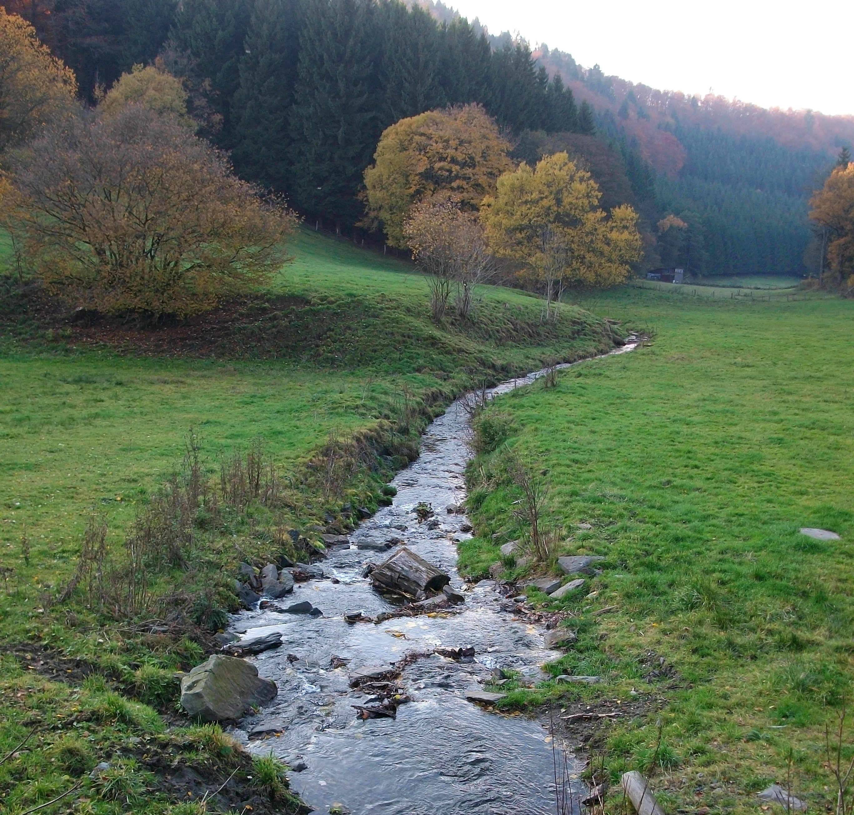 Waldsiepen in Schmallenberg-Vorwald (Germany)